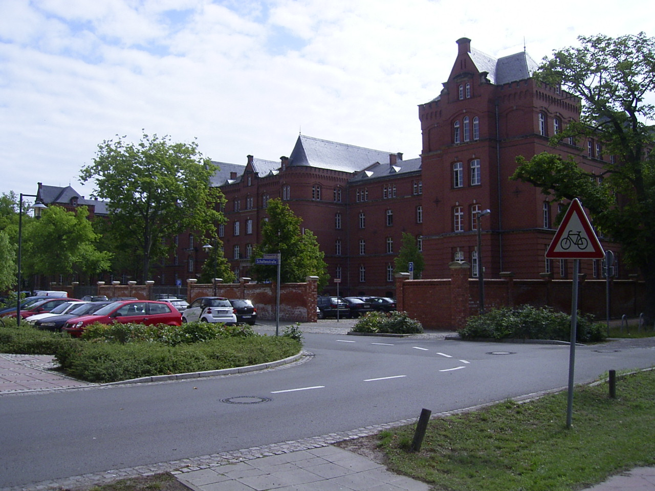 Das Landgericht in Neuruppin.This is a photograph of an architectural monument.